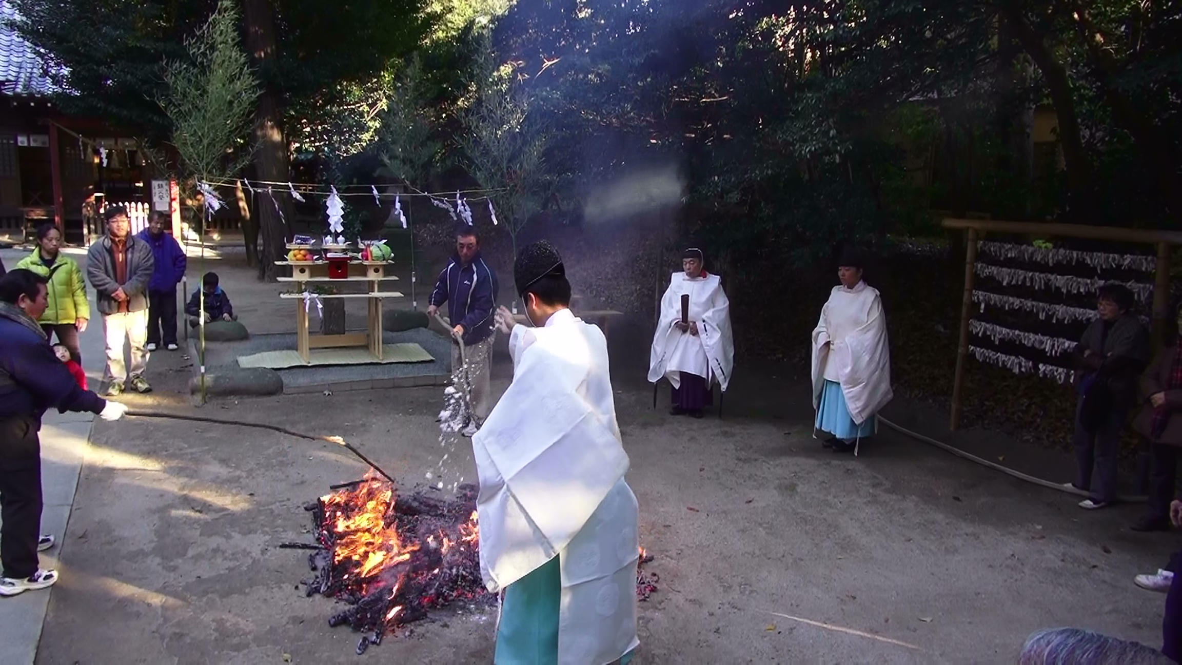 中山神社鎮火祭